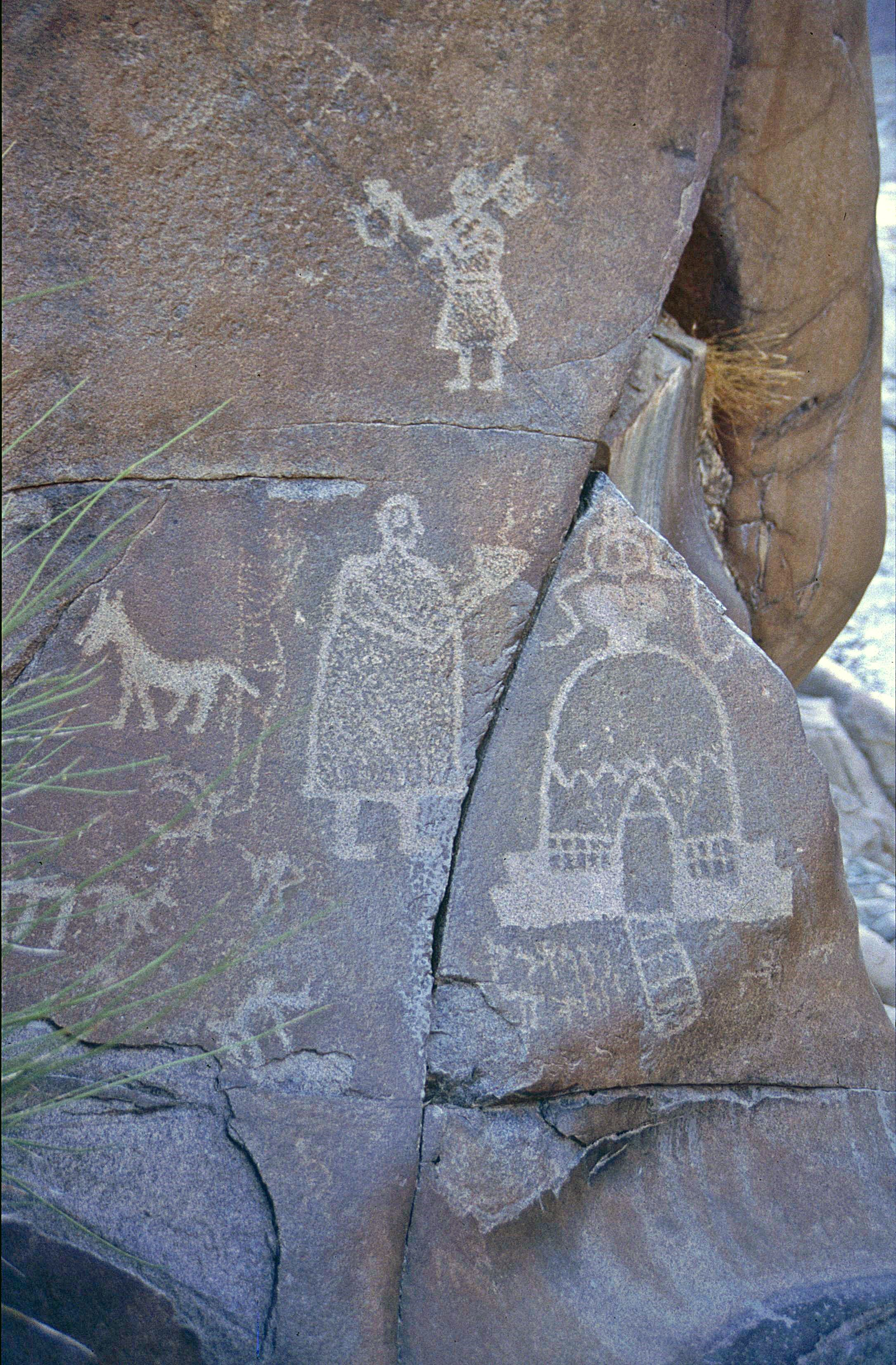 Felsbilder am Karakorum-Highway Chilas II